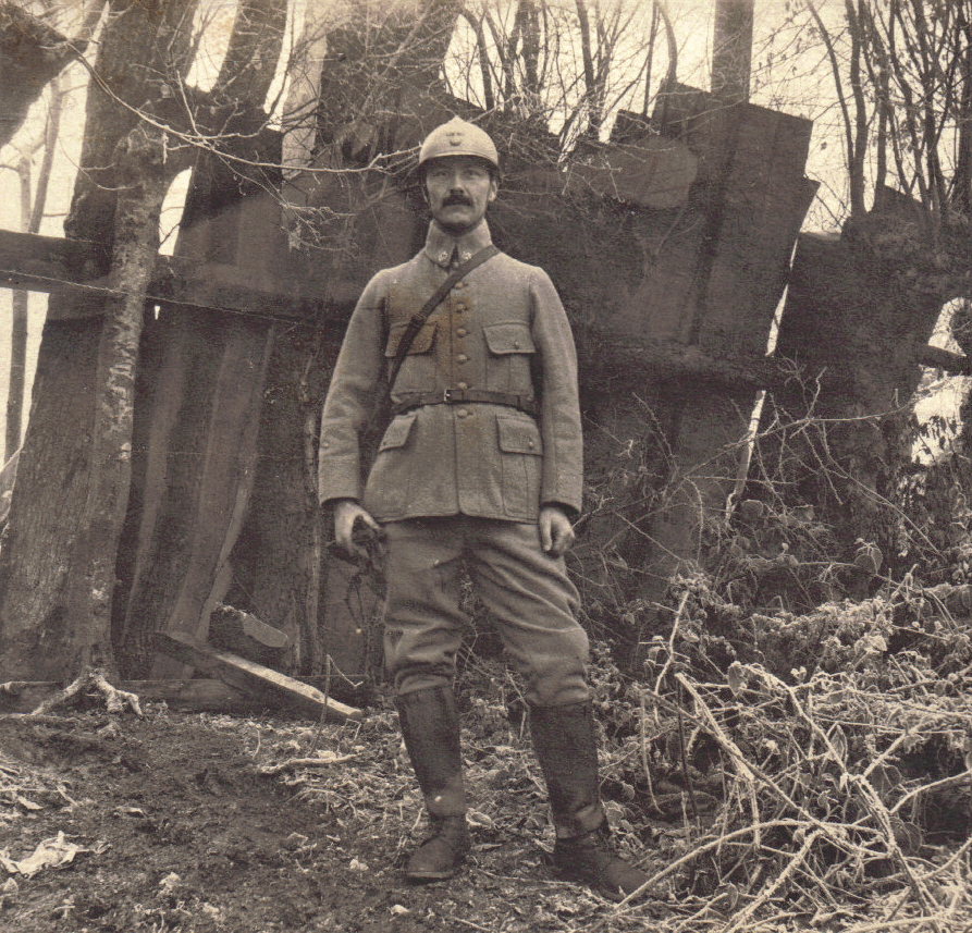 Historien et généalogiste Vendéen né à Vannes le 18 avril 1879, mort à Orfeuil (Ardenne) le 8 octobre 1918